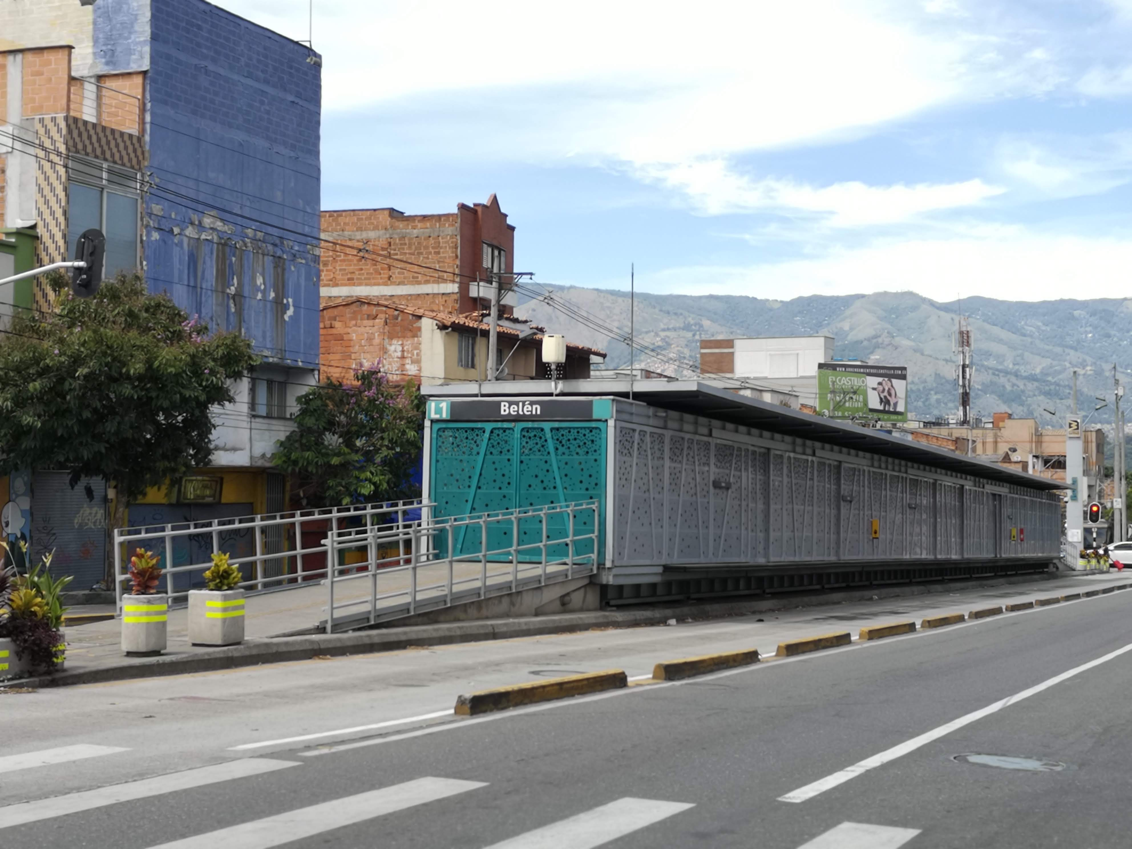 Aspecto de la estación Belén del Metroplús en Medellín, vista desde la Calle 30 hacia el oriente.